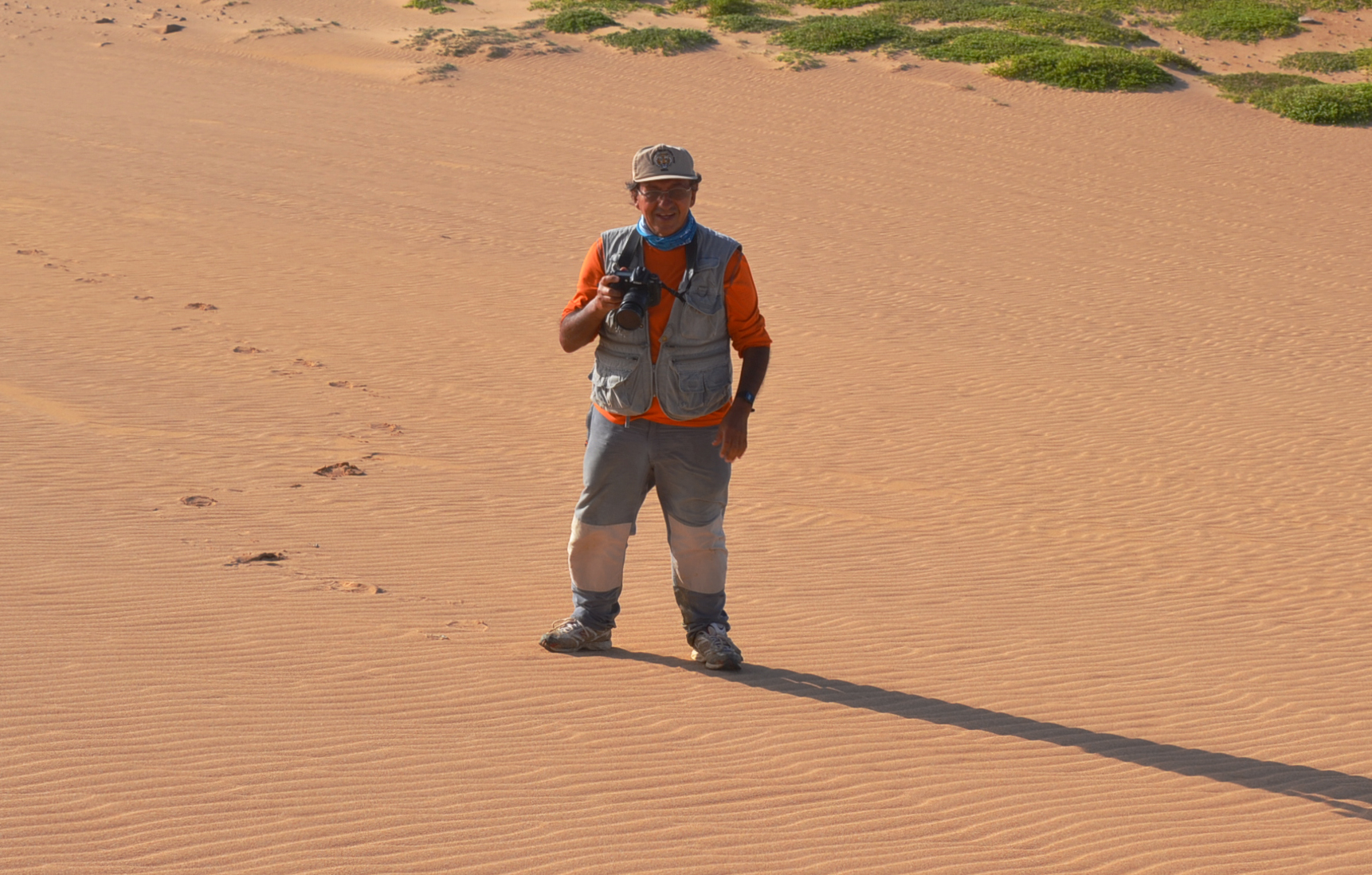 Andrés Hurtado